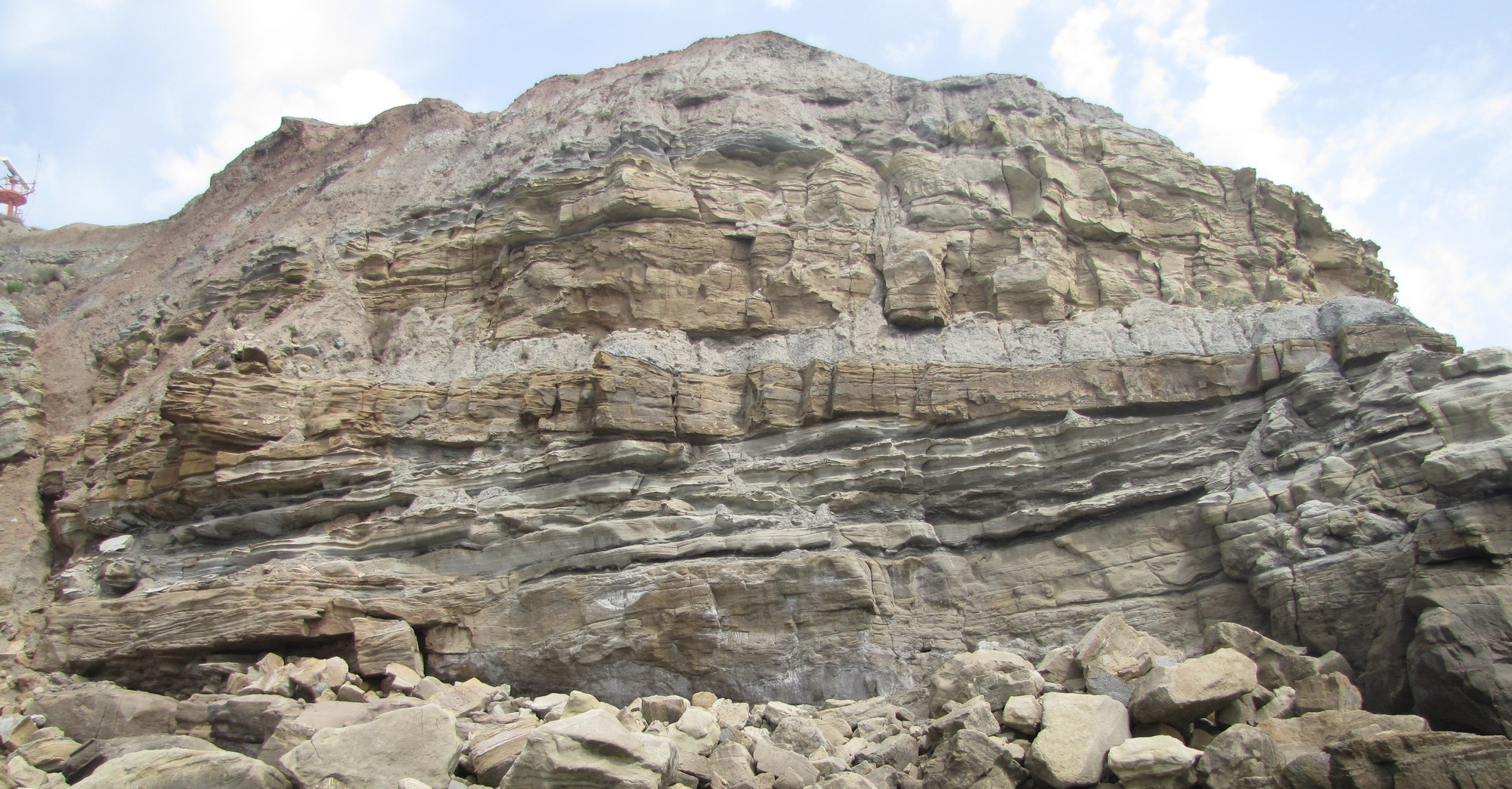 Discordância sedimentar em camadas do Jurássico superior (Paimogo Lourinhã, Portugal)